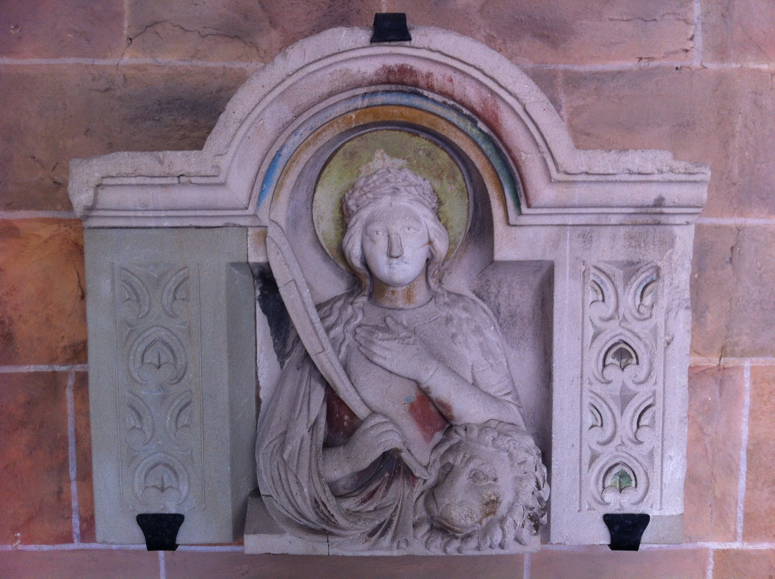 Relief der Heiligen Daria in Bad Münstereifel